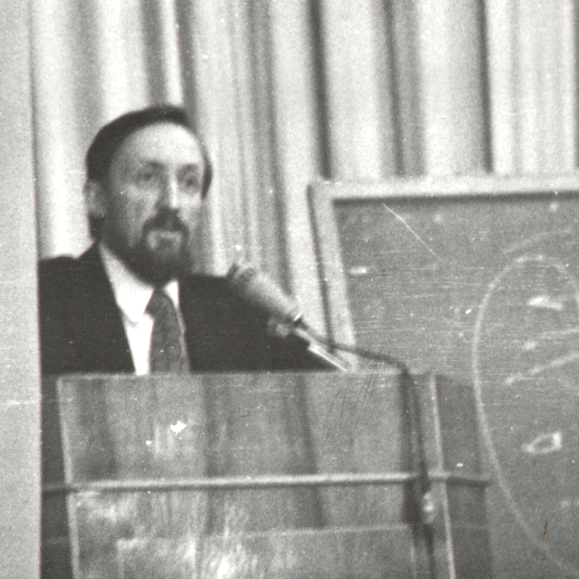 ИСЭП. выступление на уч. совете в Доме ученых.